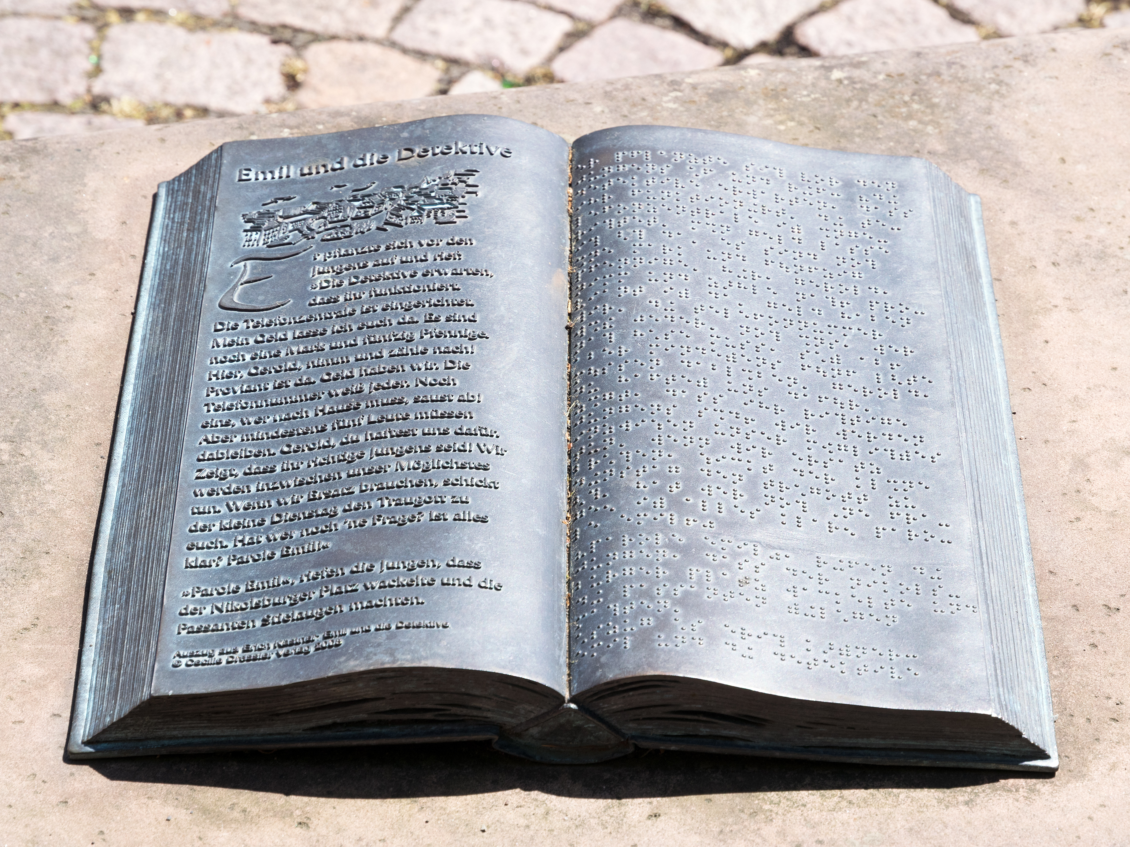 Skulptur des Buches "Emil und die Detektive" am Kornmarkt in Marburg, rechte Seite in Brailleschrift